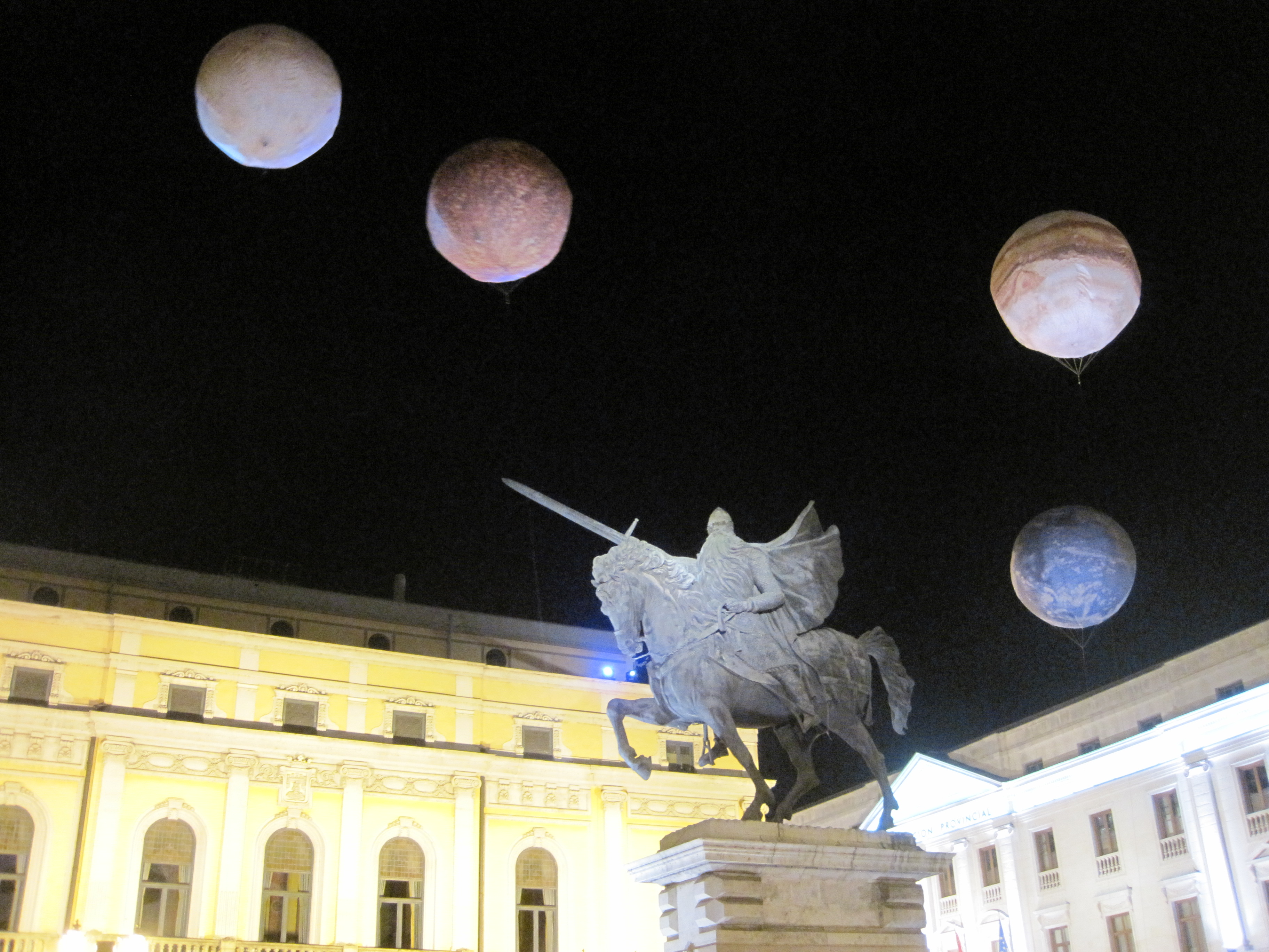 Plaza del Cid duarante la Noche Blanca de 2010.